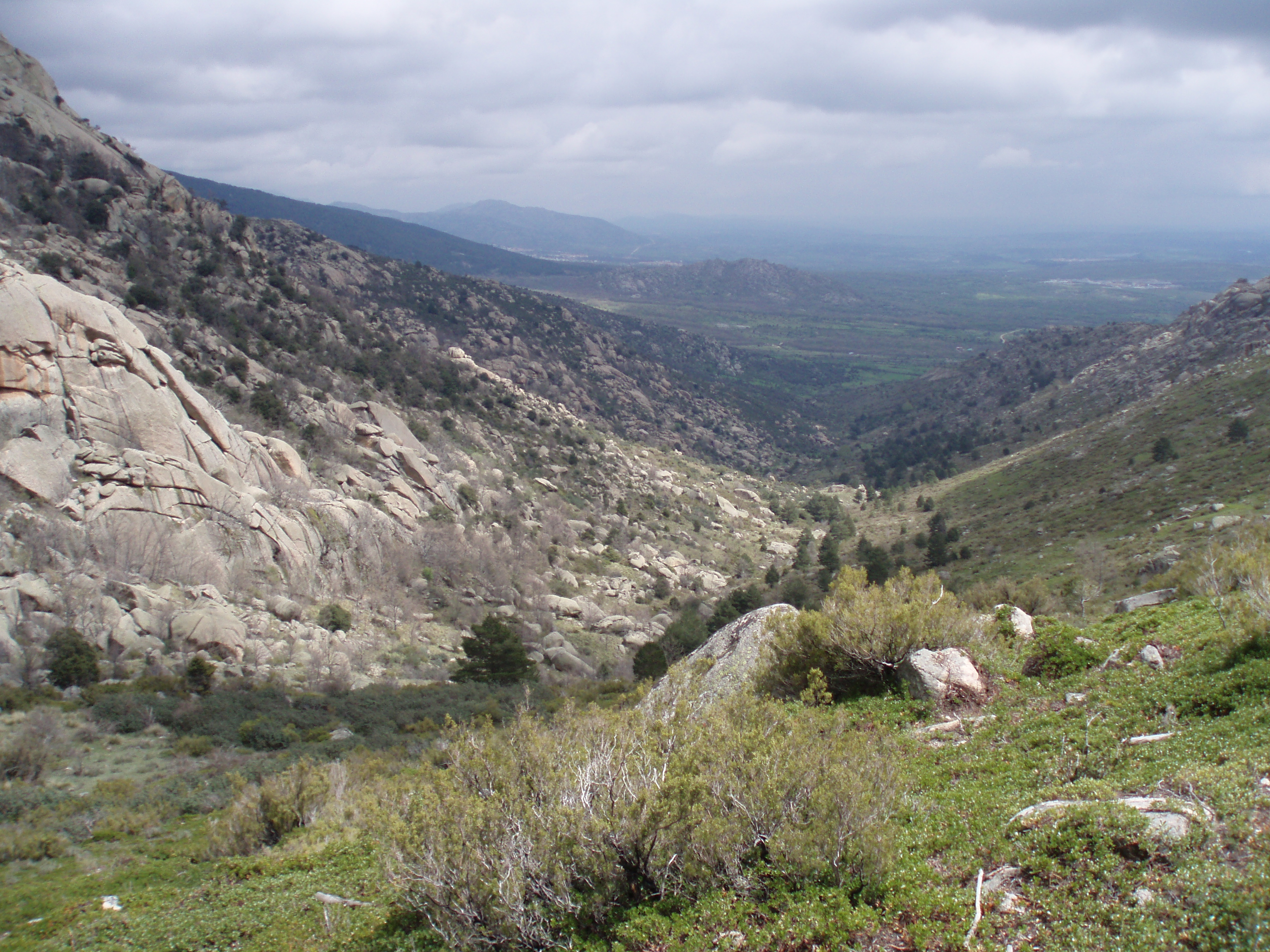 Vertiente este del collado de la Dehesilla, en La Pedriza (Sierra de Guadarrama, España).